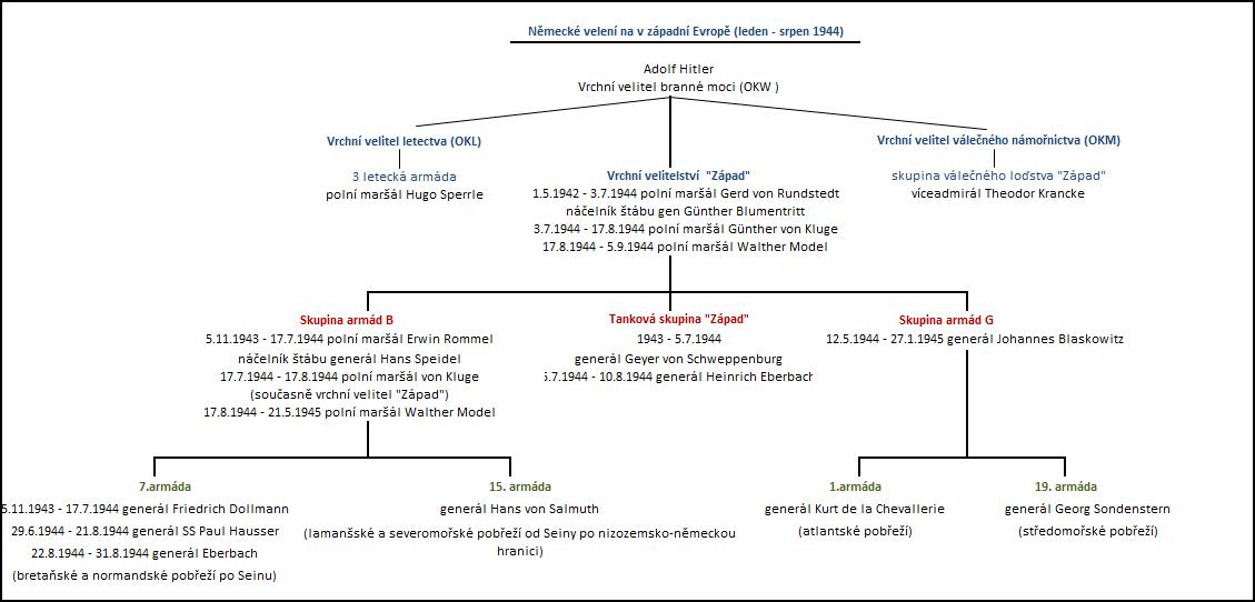 Německé velení na Západní frontě (leden - srpen 1944)